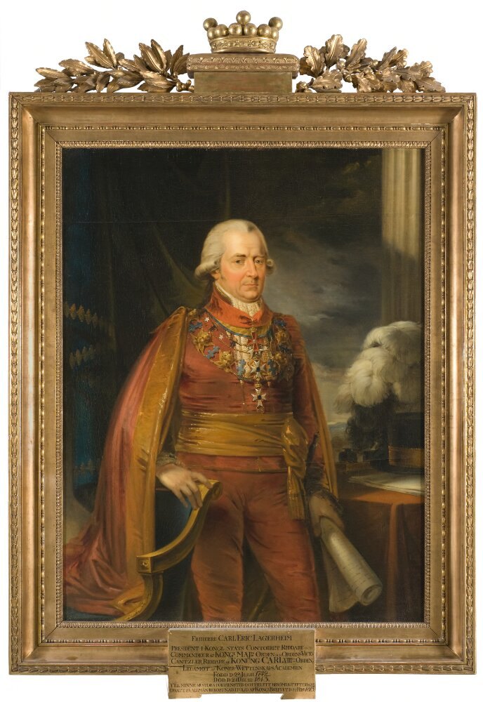 Porträtt av Karl Erik Lagerheim (1742-1813), friherre, president, gift med Anna Christina Gerdes. Lagerheim är iklädd lilla serafimerdräkten. Runt halsen bär han kedjor för Serafimerorden samt Nordstjärneorden. Han bär kommendörstecknet för Svärdsorden, samt riddartecknet för Carl XIII:s orden. Målning av Johan Gustaf Sanberg.